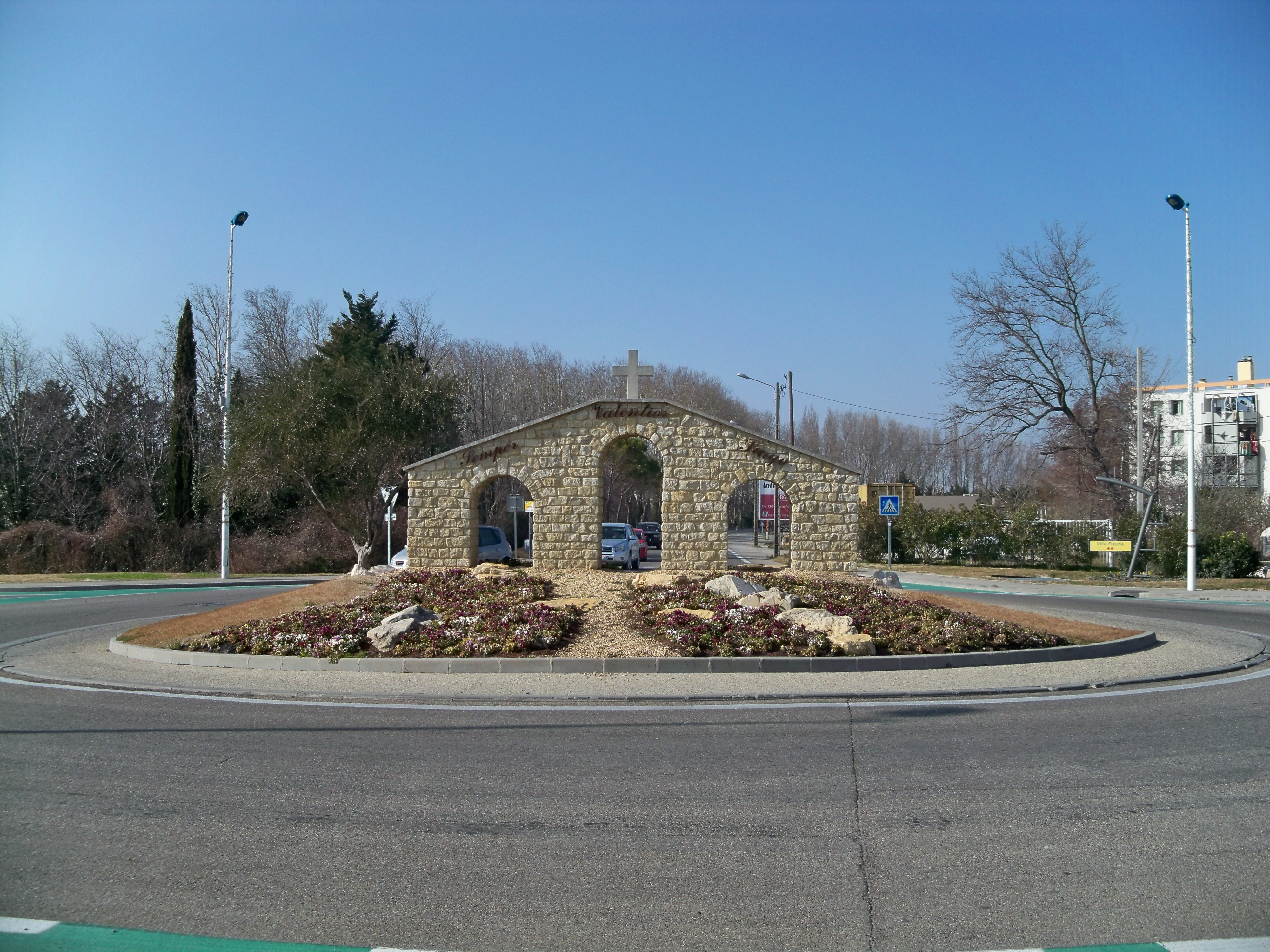 Palais des Papes de Sorgues - copie sur giratoire de l'ancien pont sur la Sorgue (aujourd'hui l'Ouvèze)